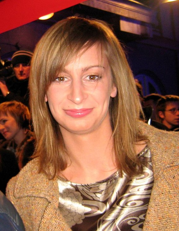 Magdalena Schejbal (ur. 7 lutego 1980 r. we Wrocławiu) - polska aktorka filmowa.